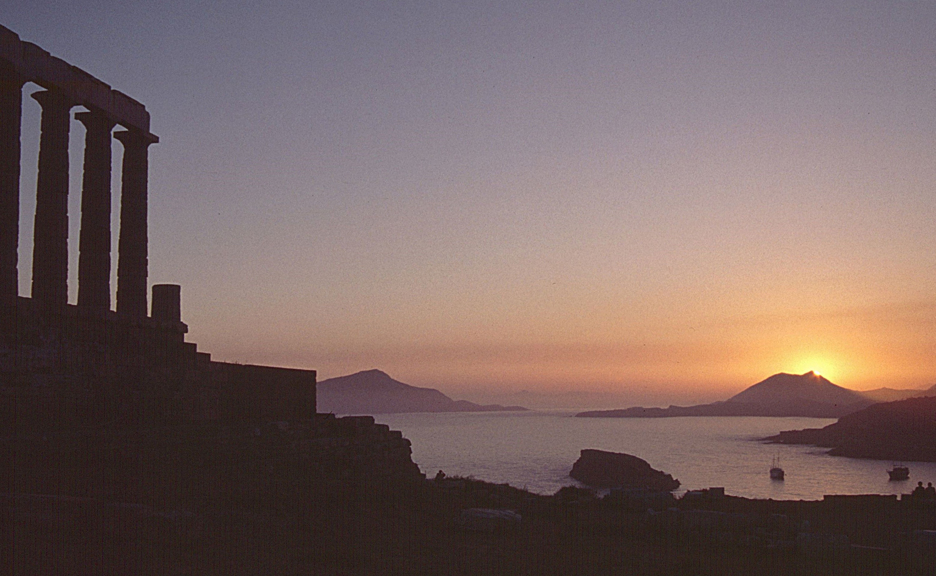 Poseidontempel am Kap Sounion